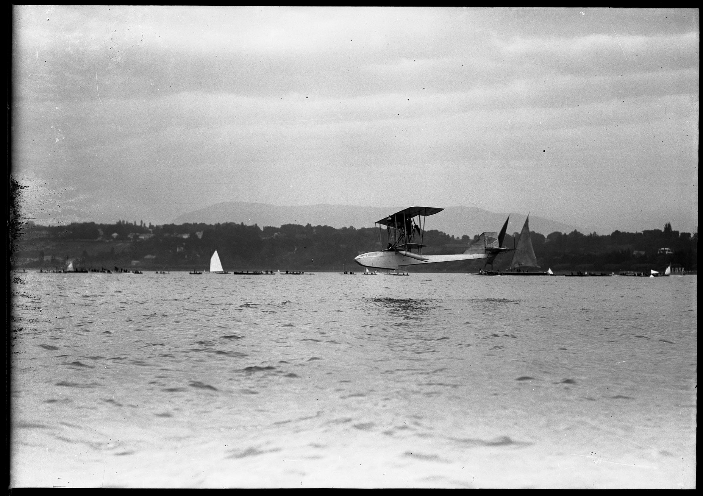 Championnat d'Europe d'aviron et meeting d'aviation les 19 et 20.08.1912. L'appareil Donnet-Lévêque piloté par André Beaumont vole au large de l'hôtel National